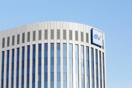 dfv Stammhaus in Frankfurt